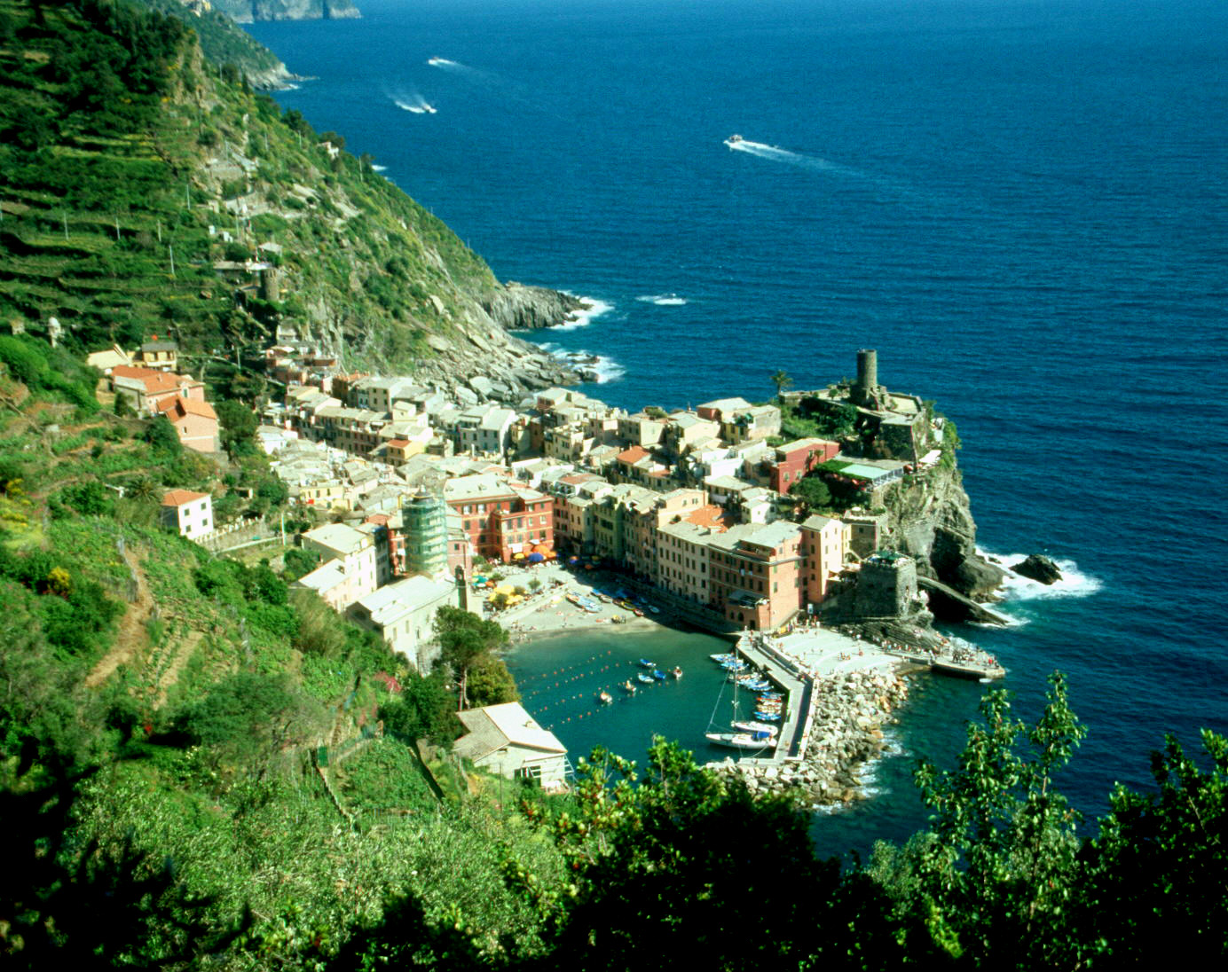 Vernazza 2004